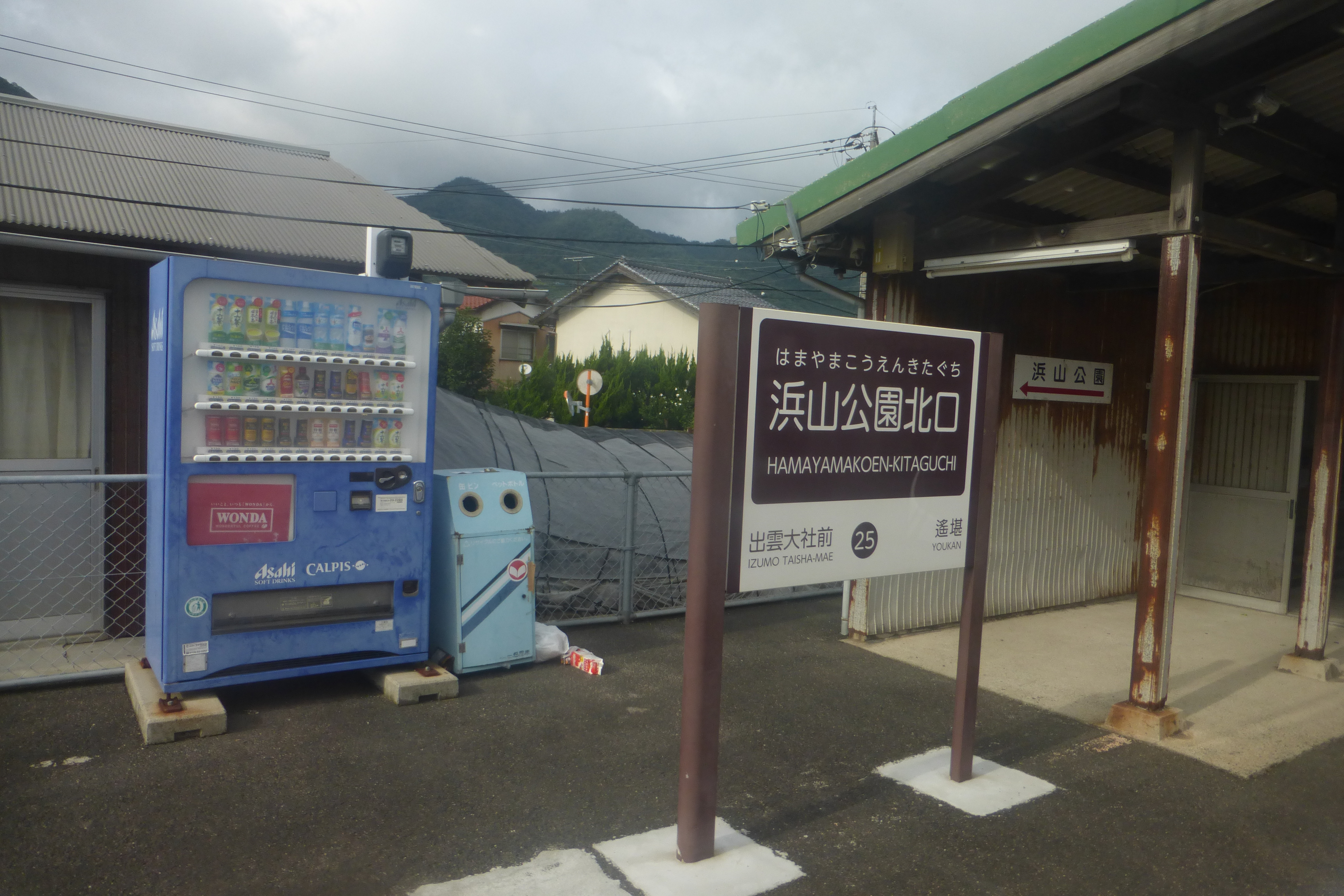 Hamayamakōen-mae Station platform (浜山公園北口駅のホーム)